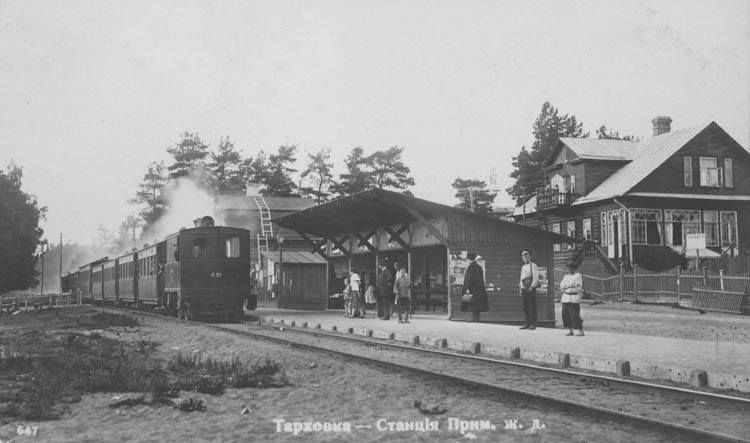 Станция Тарховка Приморской ж.д.